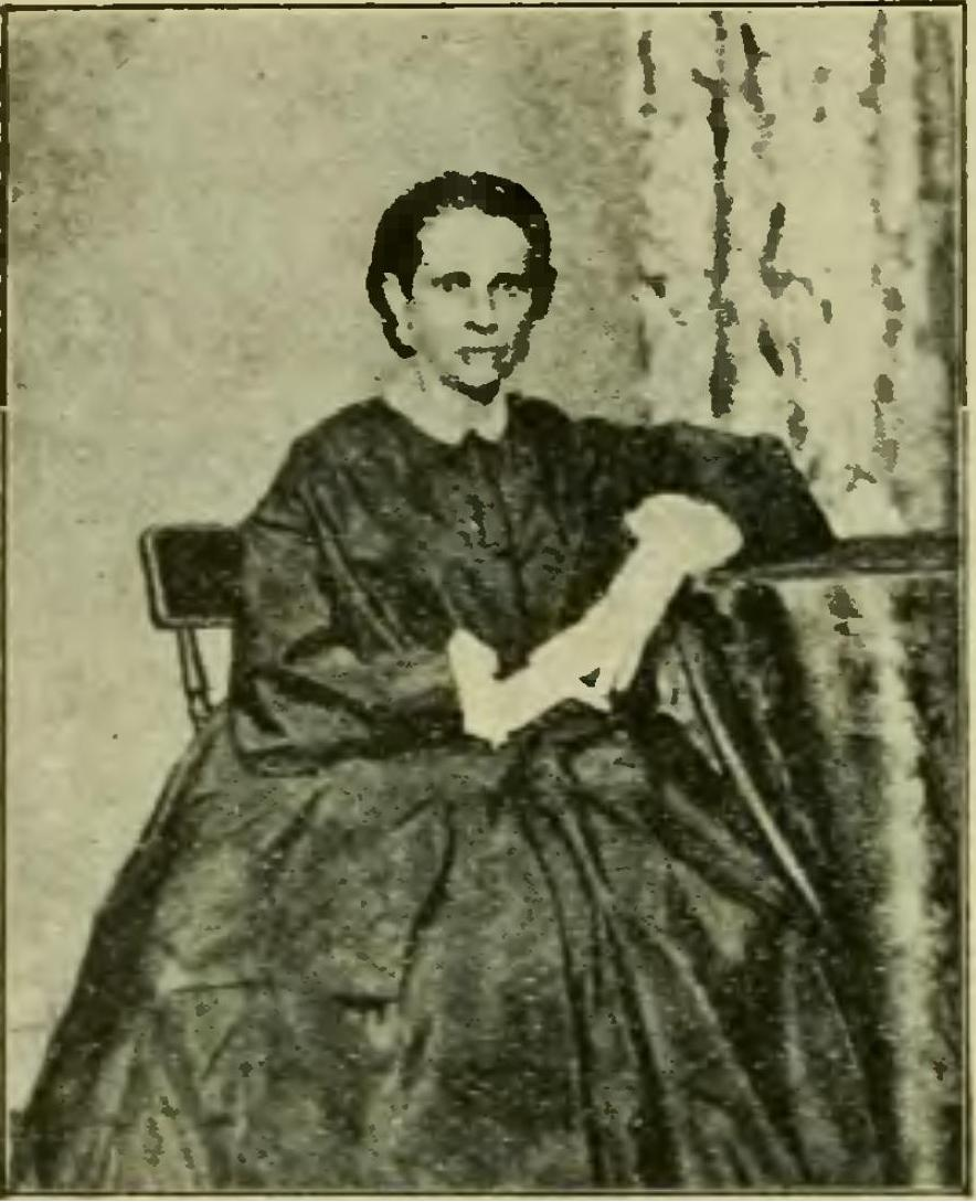 Enfermeira Anna Nery, c.1903